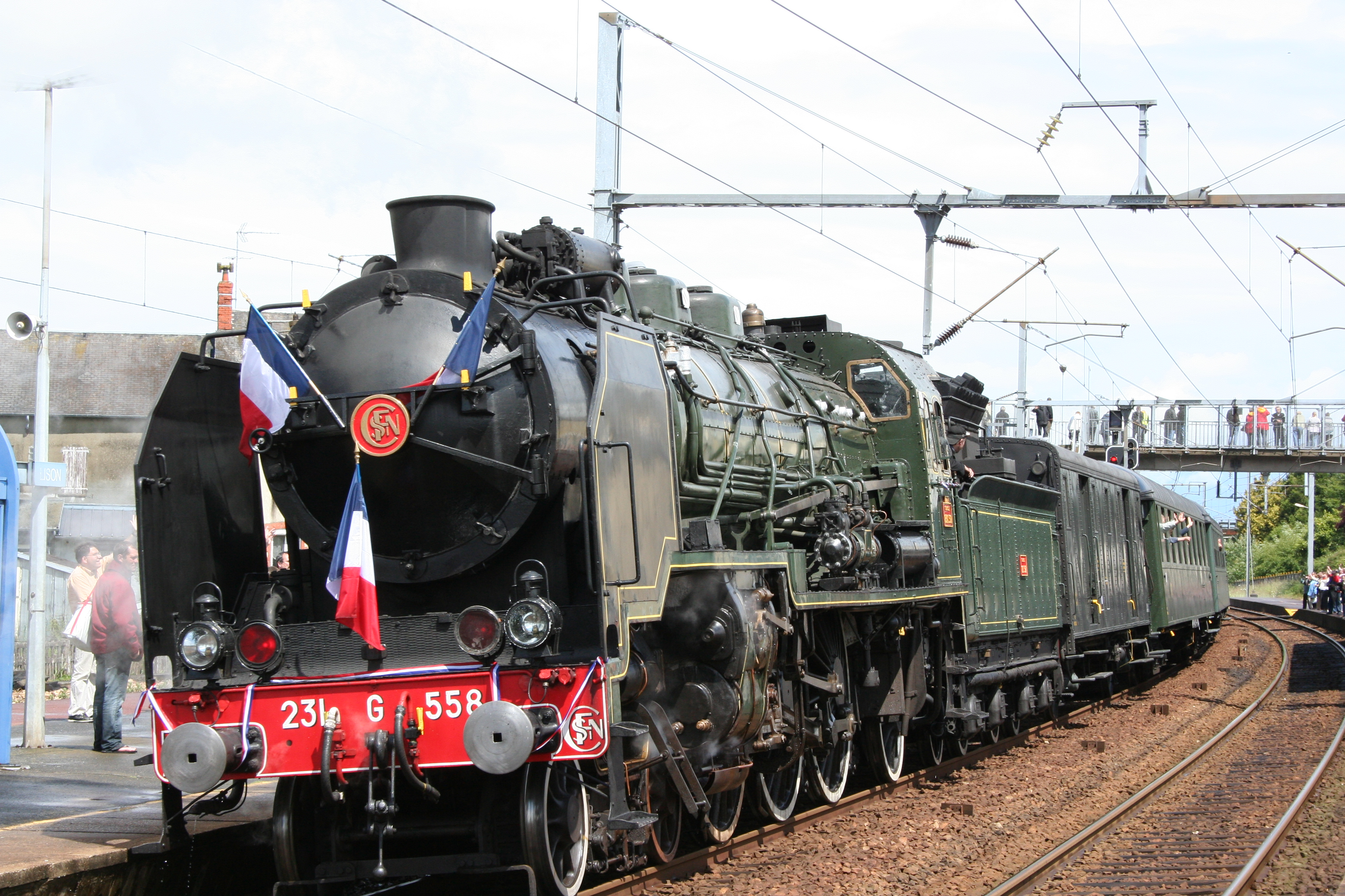 Train de la liberté lors du 65e anniversaire du débarquement du 7 juin 2009 en gare de Lison. Le train est la Pacific 231 G 558 qui effectuait un trajet Lisieux à Lison